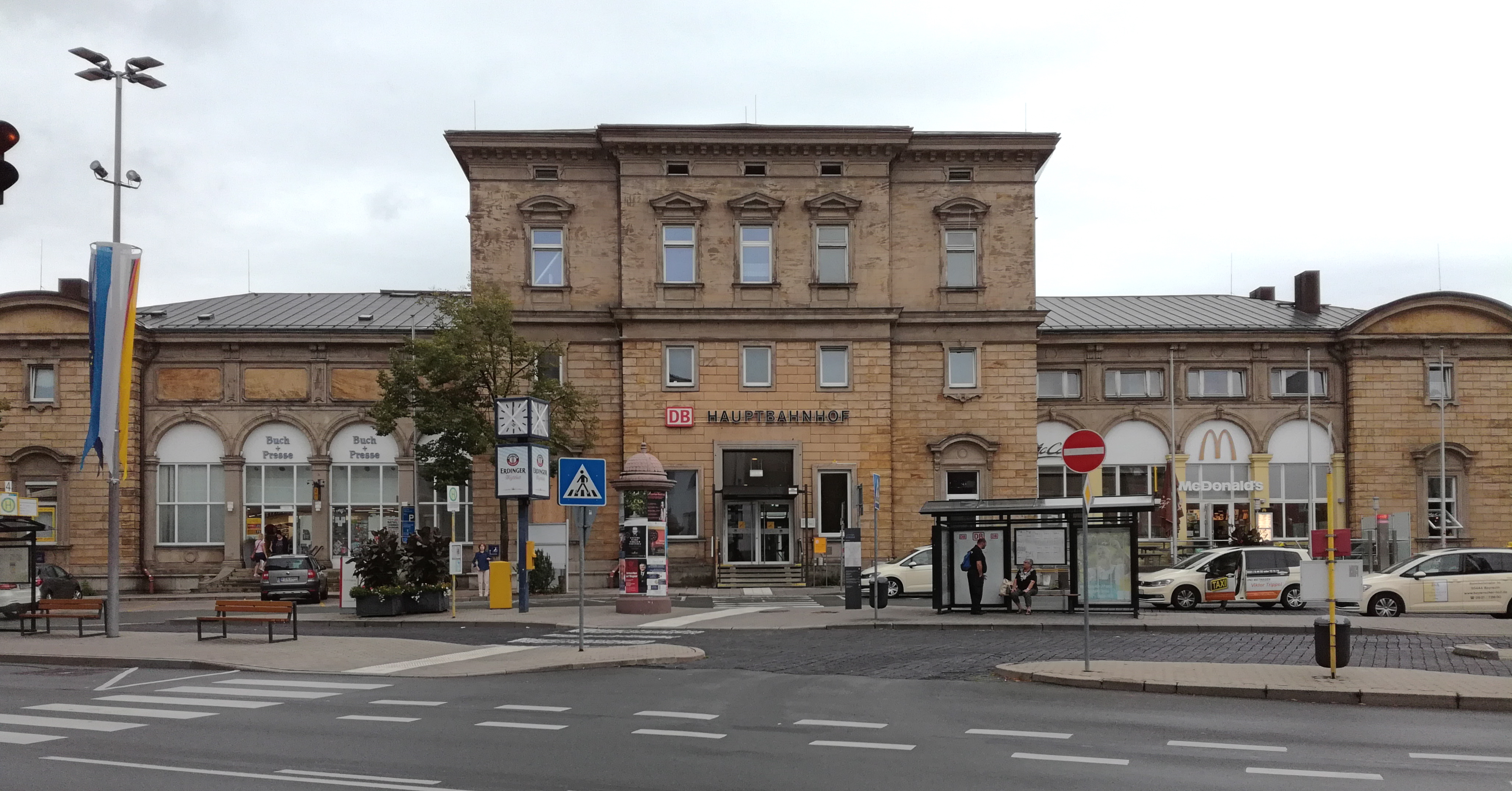 Empfangsgebäude des Hauptbahnhofs Bayreuth